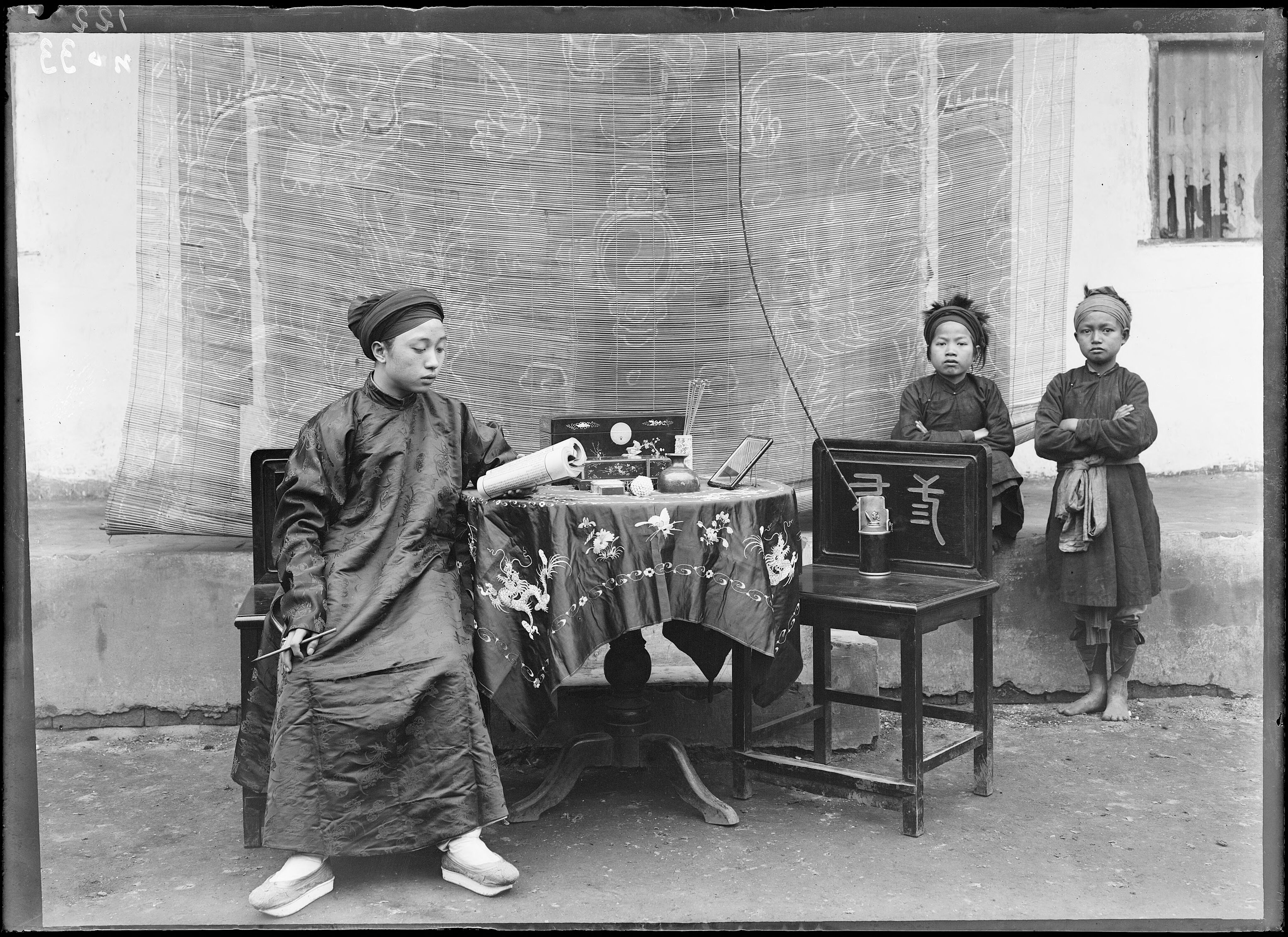 Tonkin. Langson. N°33, Vi-van-Dinh, fils du tong-doc de Langson / [photogr.] A. S[alles] Auteur : Salles, André (1860-1929).